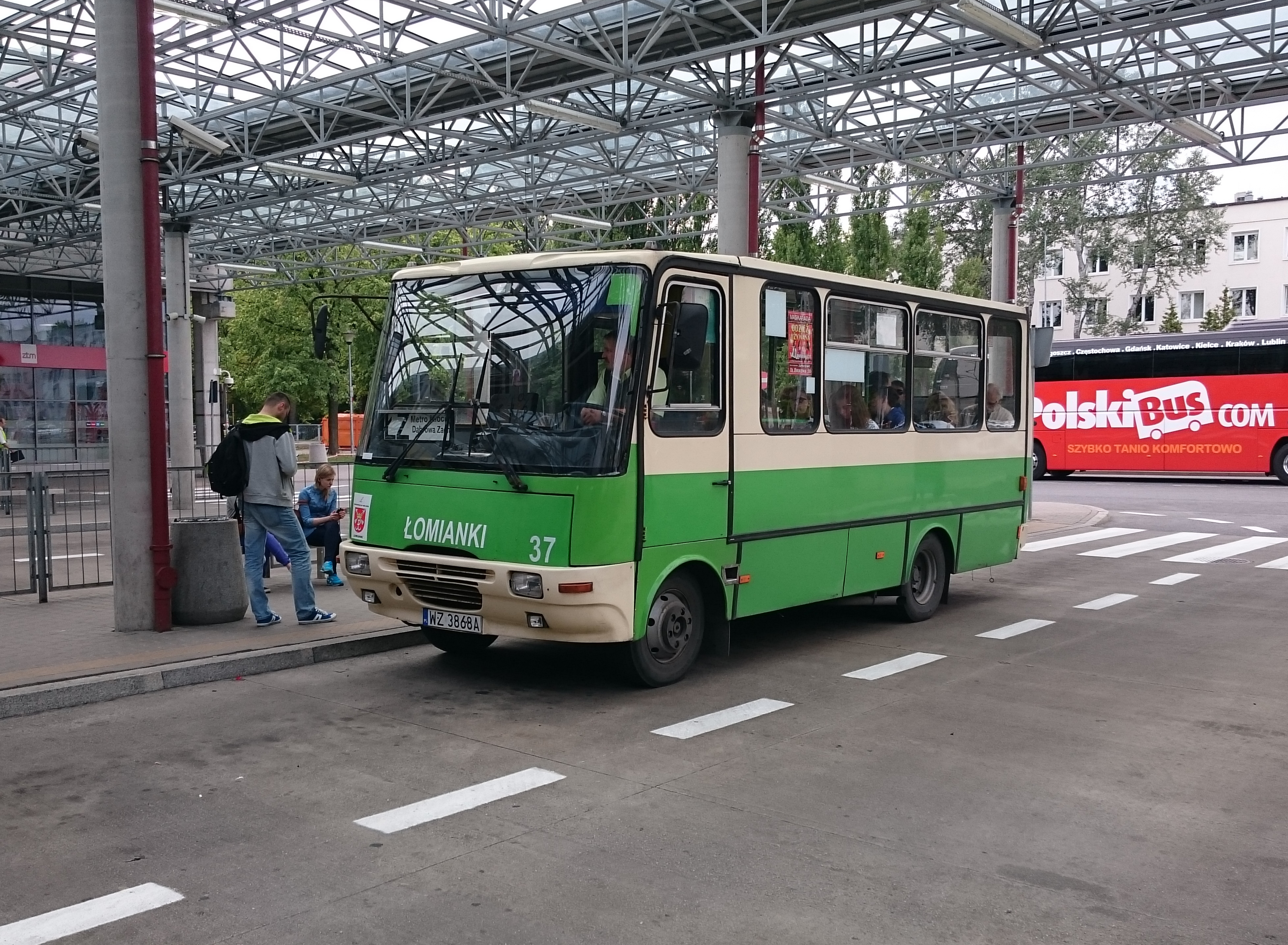 Autobus KM Łomianki na Młocinach - linia Łz